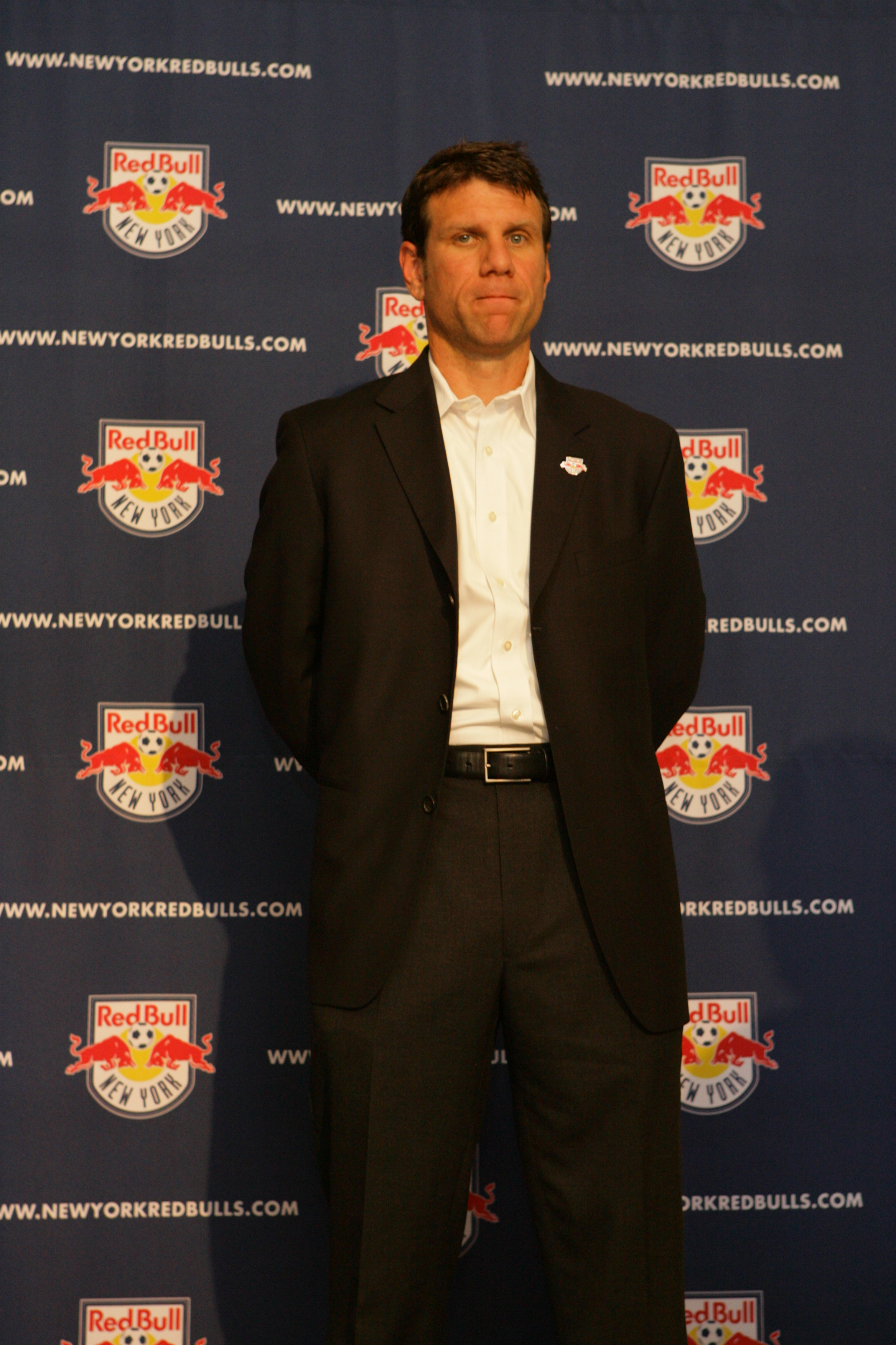 RedBullNY_011